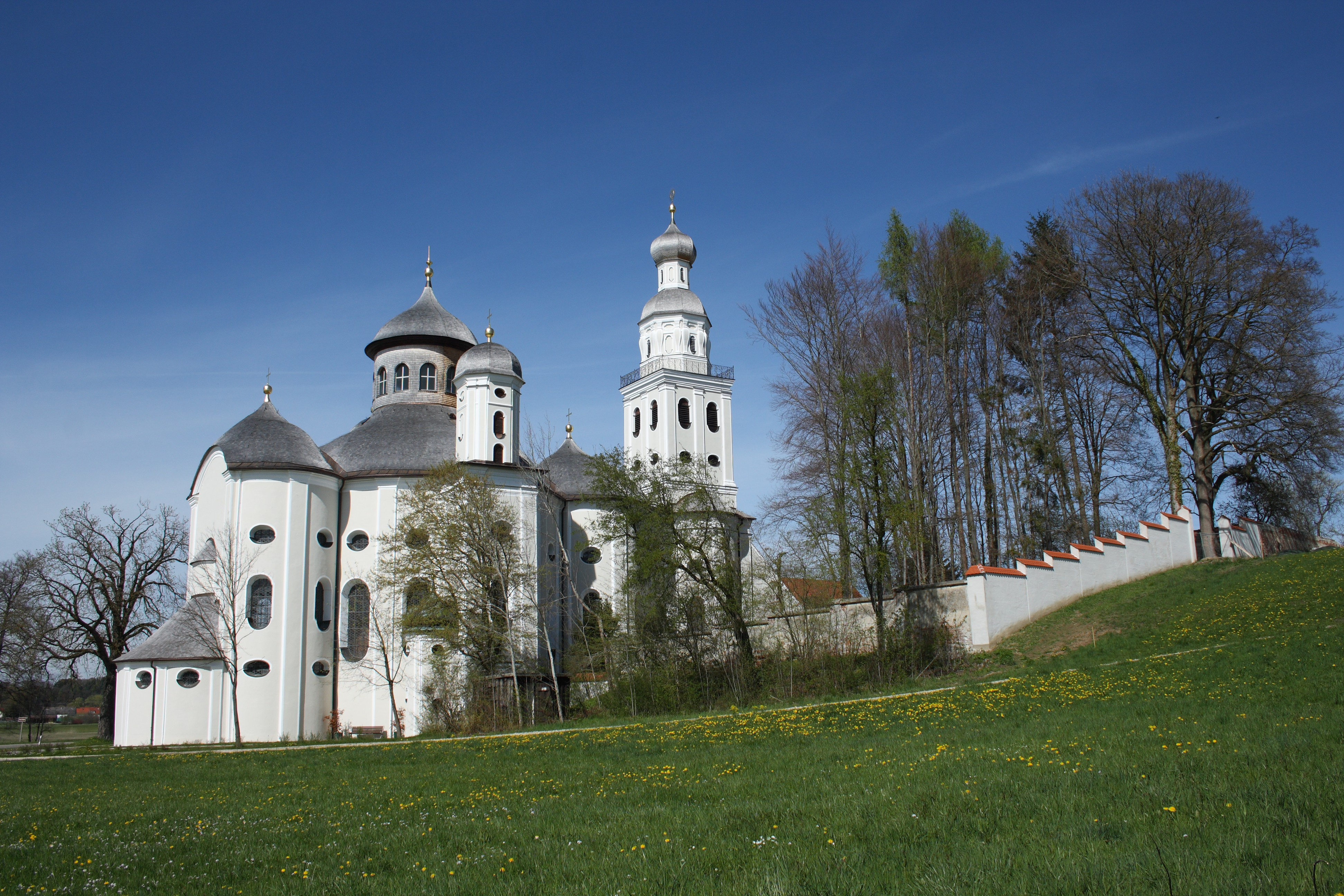 Wallfahrtskirche Maria Birnbaum in Sielenbach im Landkreis Aichach-Friedberg (Bayern)